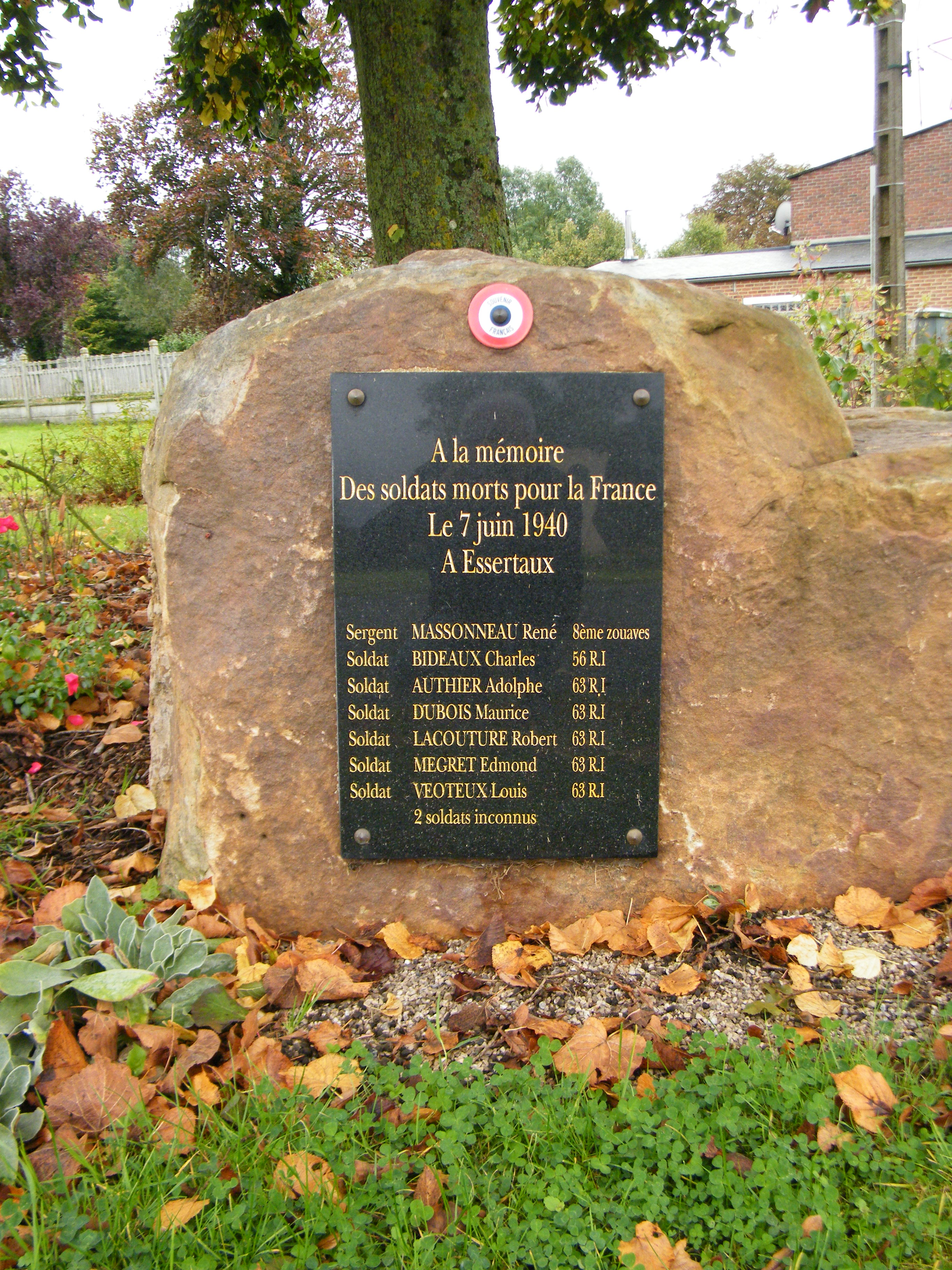 Plaque commémorative.